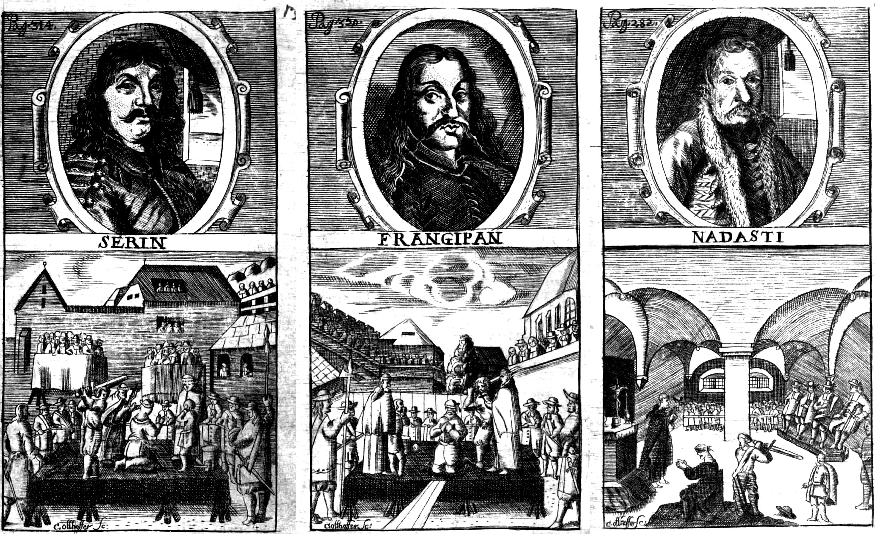 Zrínyi, Frangepán és Nádasdi lefejezése. Illusztráció a Historia della ribellione d'Ungheria di Gio. Andrea Angelini Bontempi perugino című műből